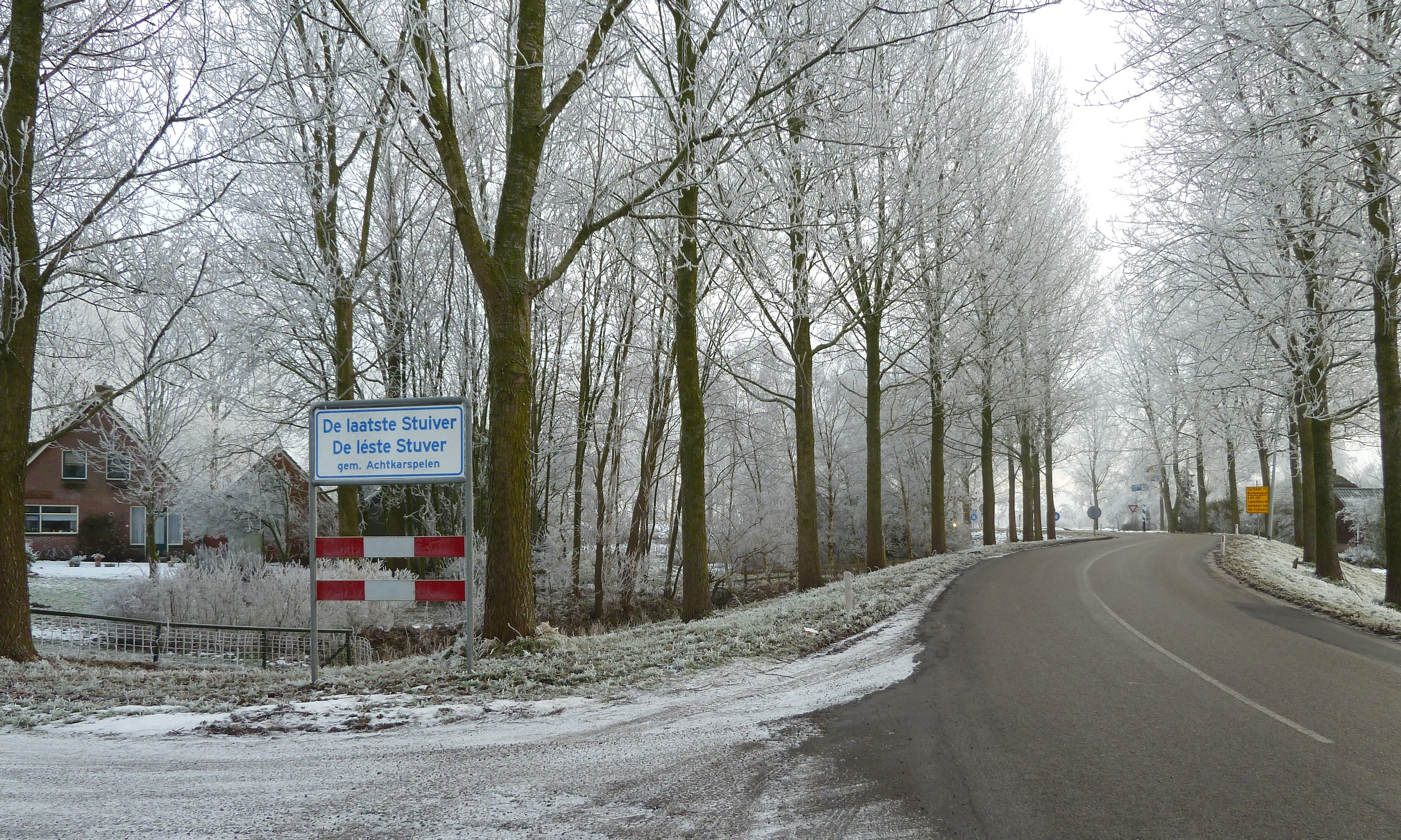 Naambordje van het buurtschap De laatste Stuiver, een naam die ook vermeldt staat op het eerste huis links.